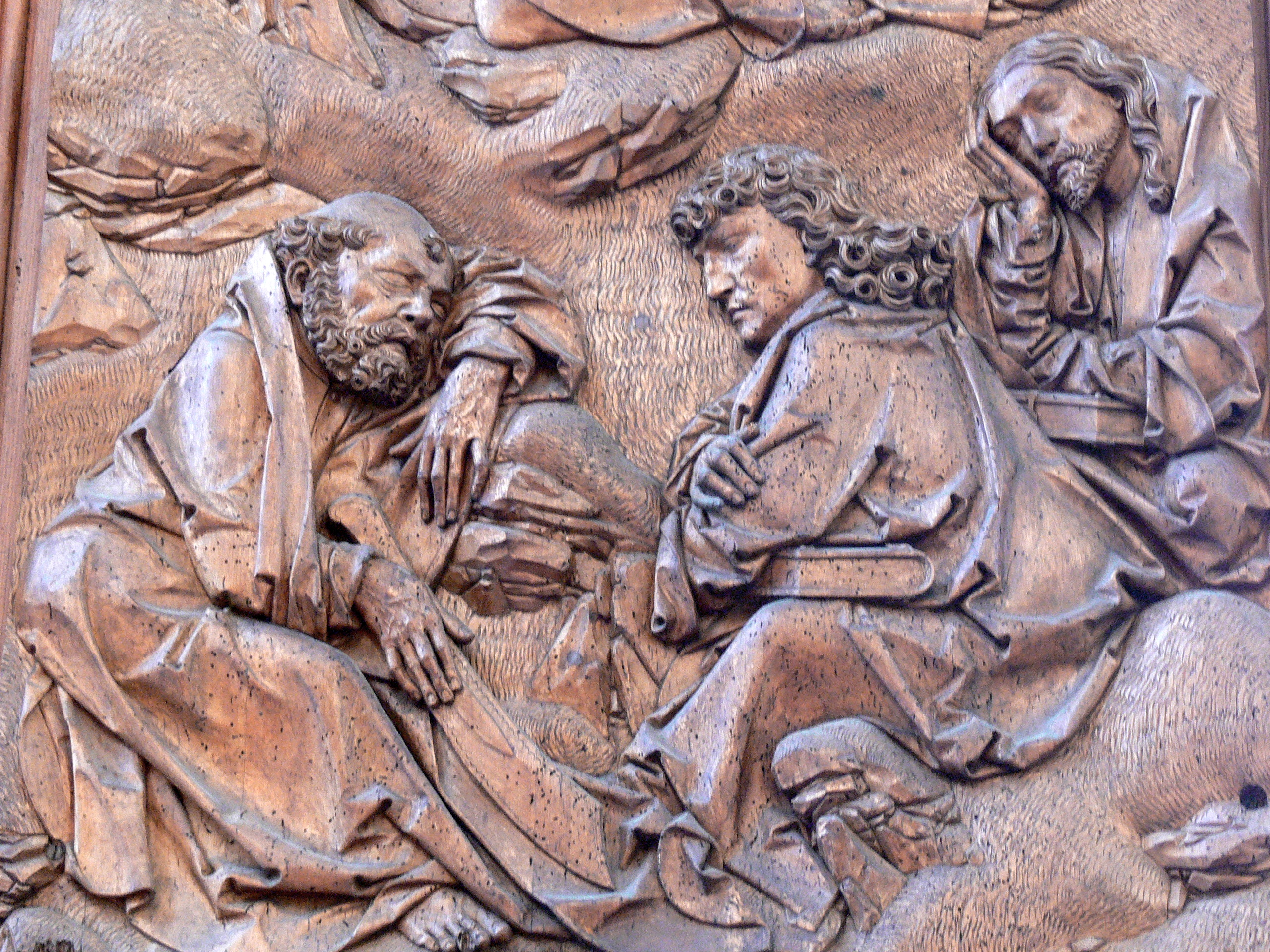 Heilig-Blut-Altar in St.Jakob in Rothenburg. Rechter Altarflügel: Schlafende Jünger im Garten Gethsemane